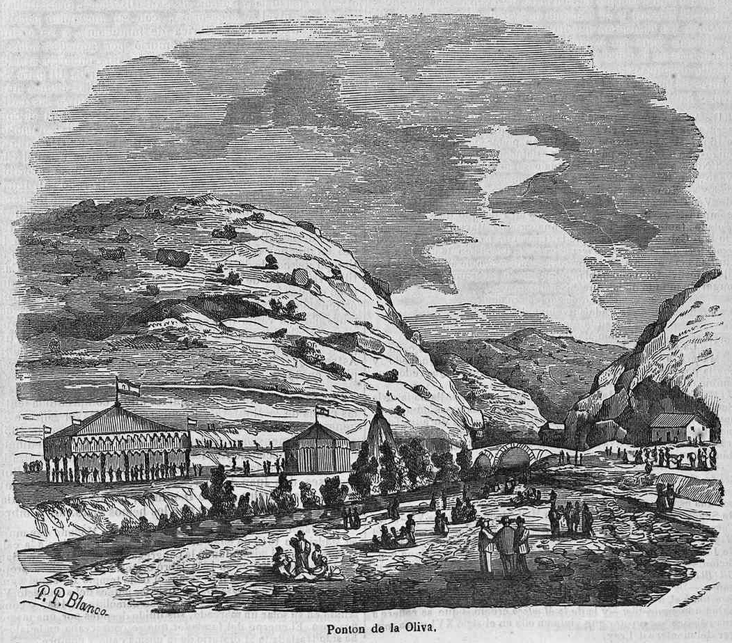 Grabado del Pontón de la Oliva, publicada en la revista española La Ilustración.